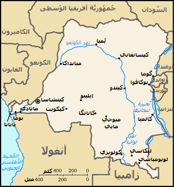 خريطة زائير من سنة 1996م بحسب كتاب حقائق العالم.